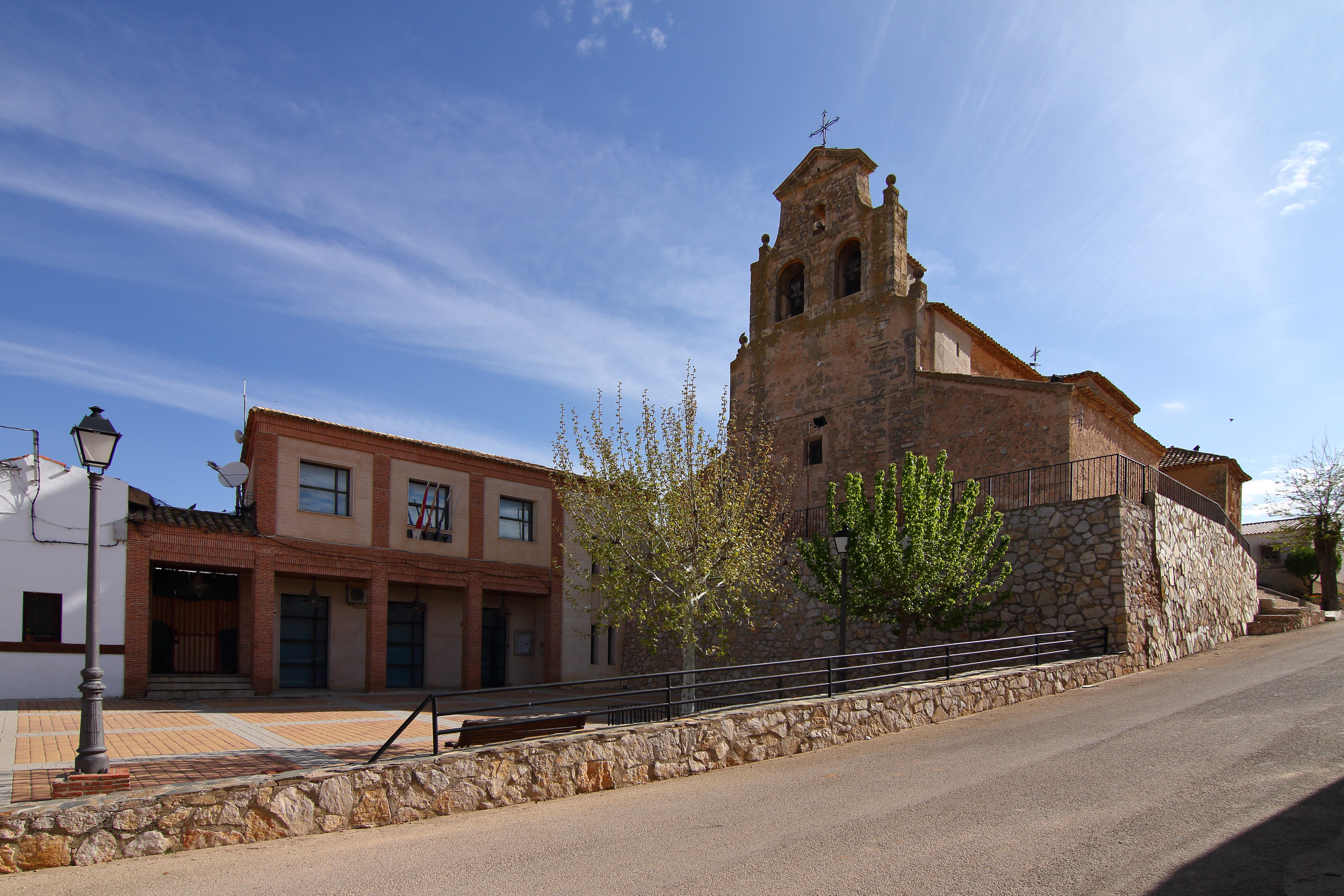 Hontecillas, Iglesia y Ayuntamiento